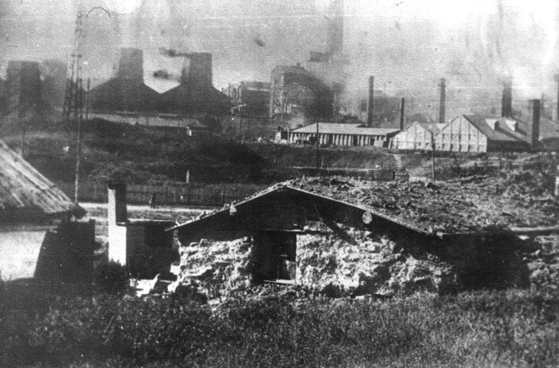 Юзівський завод. Фото кінця ХІХ - початку ХХ ст.